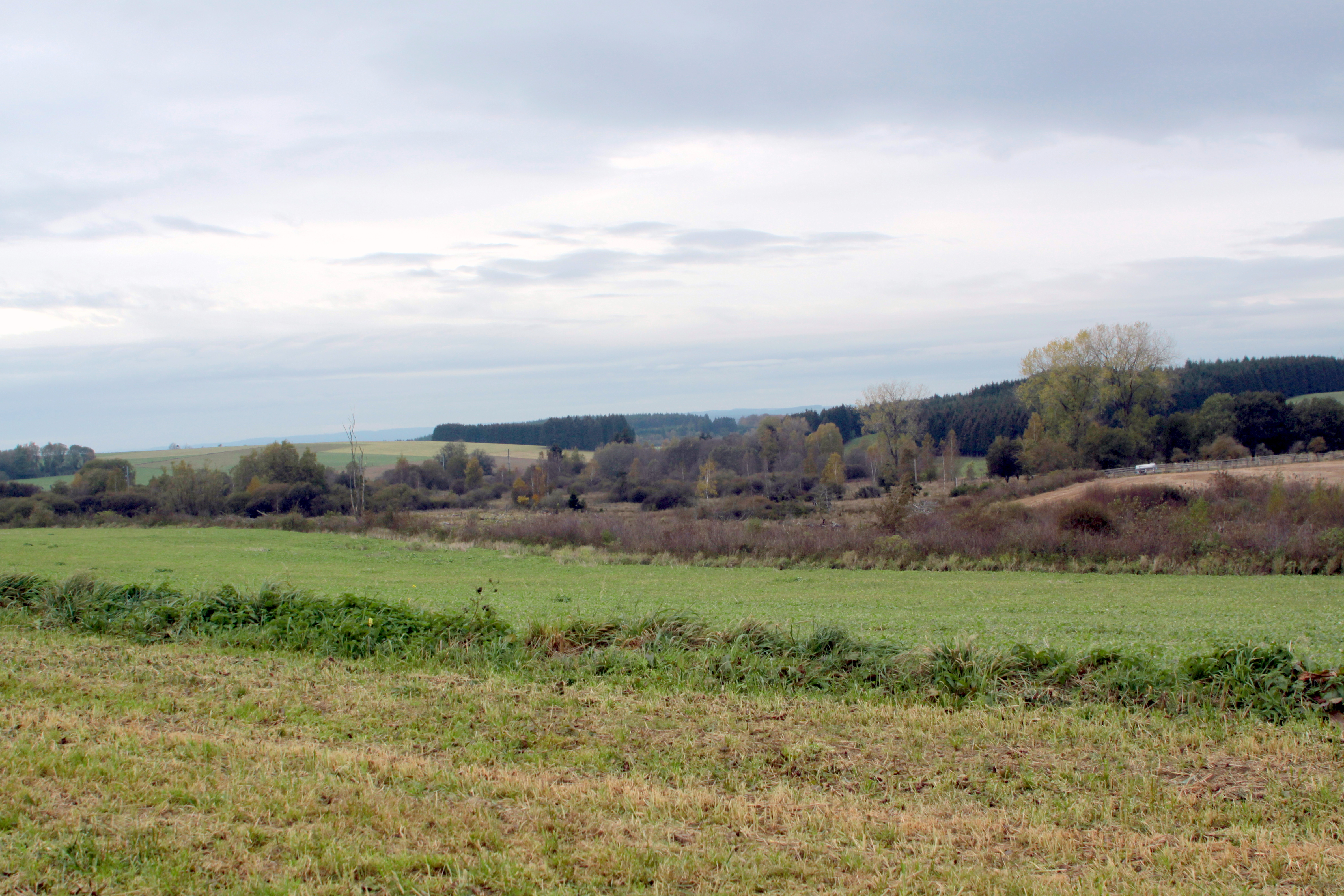 D'Quellgebitt vun der Fooschtbaach